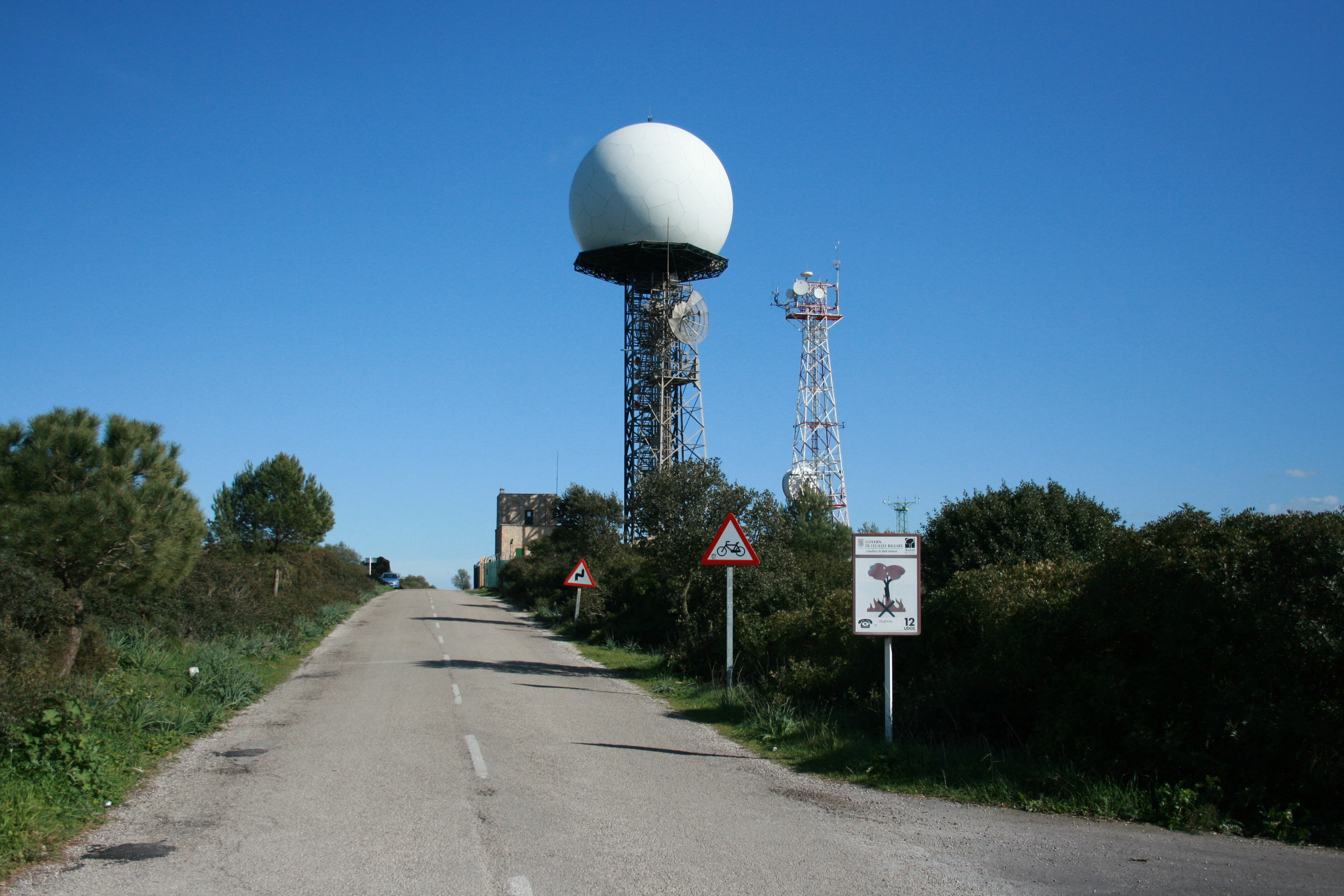 Puig de Randa in Algaida, Mallorca